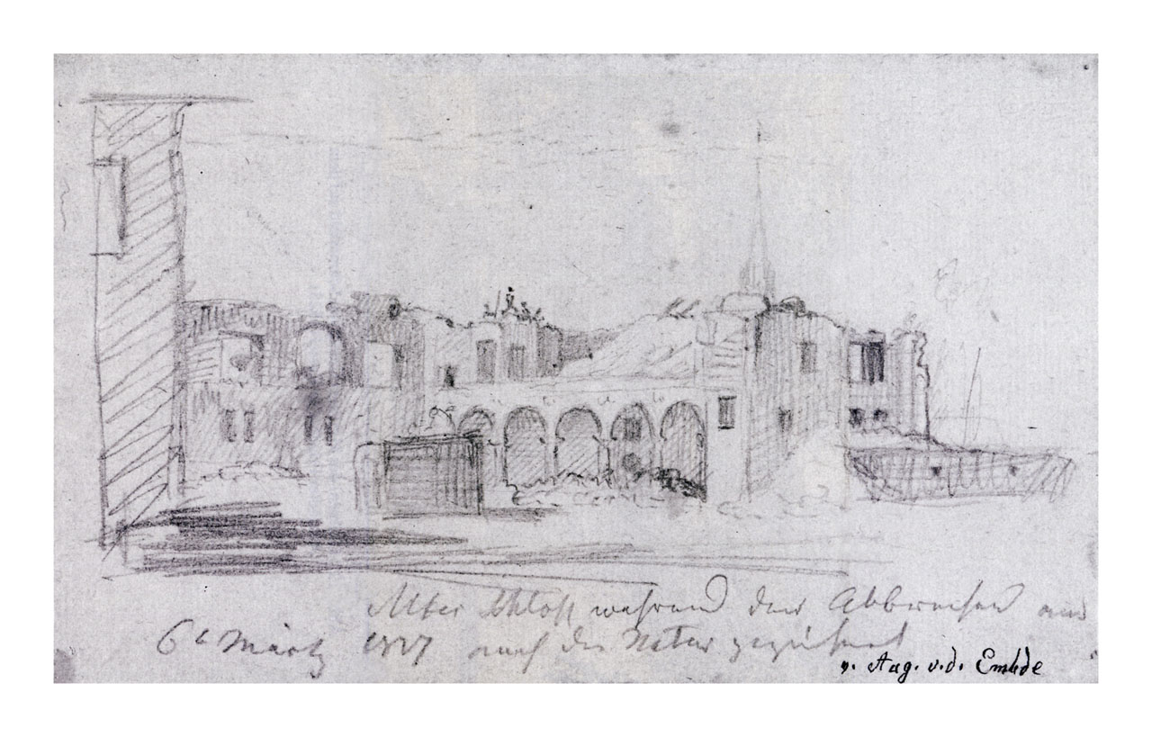 „Ansicht des alten Residenzschlosses während des Abbruchs am 6. März 1817. Blick auf den Nordflügel, im Hintergrund Turm der Brüderkirche., 1817“, in: Historische Ortsansichten (Stand: 17.11.2008)